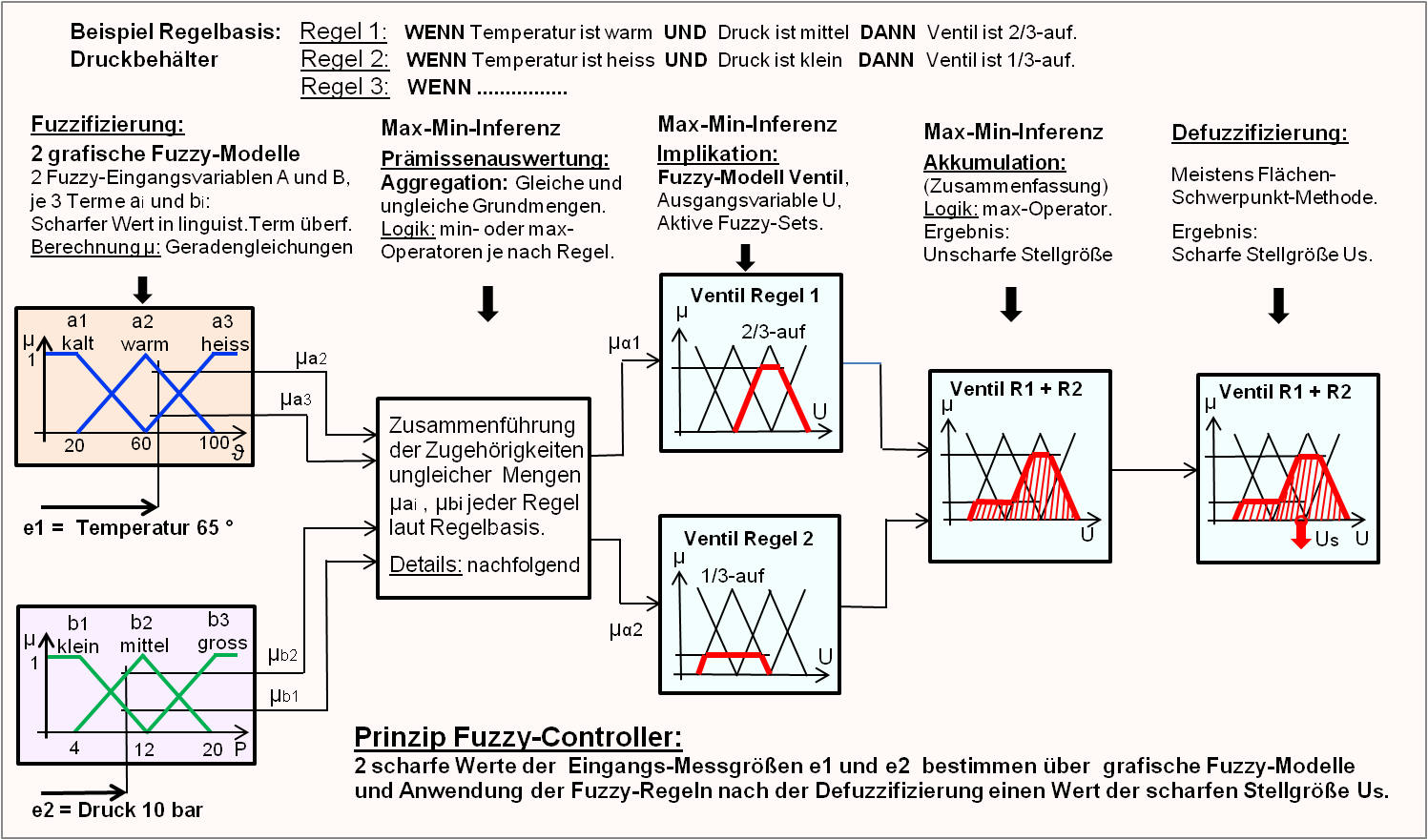 Blockschaltbild des Prinzips des Fuzzy-Controllers